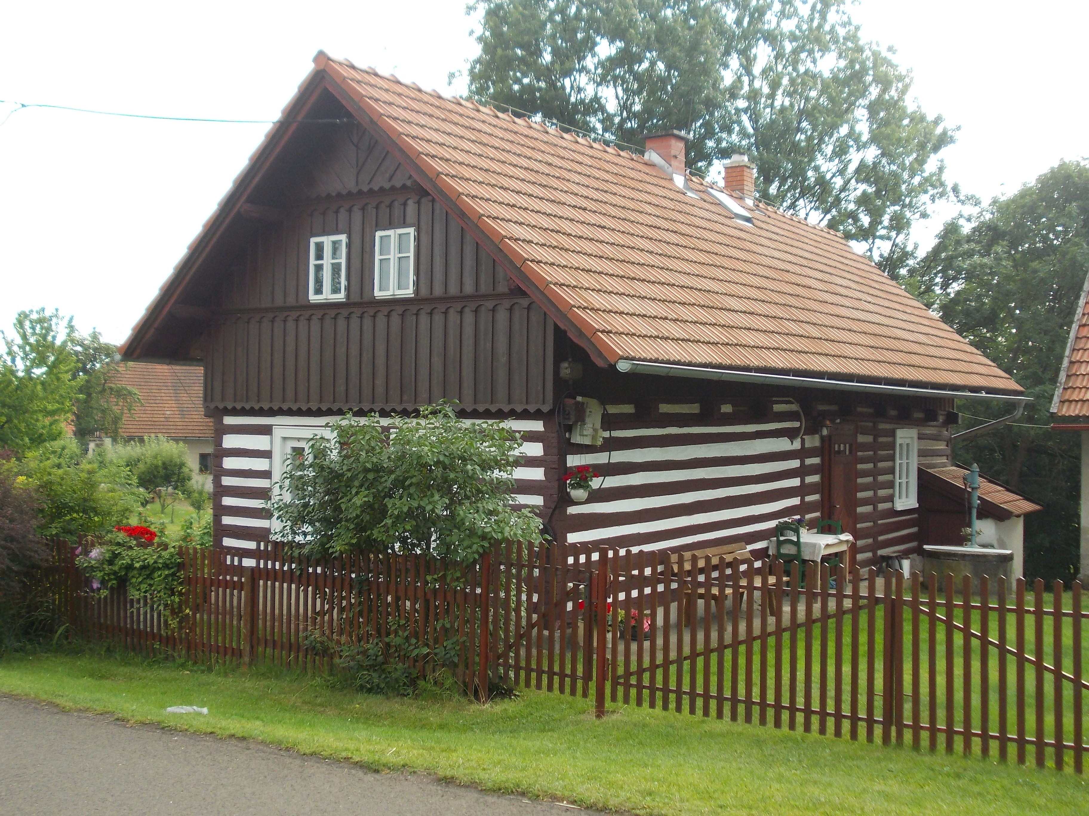 Pekloves - dům č.p. 2